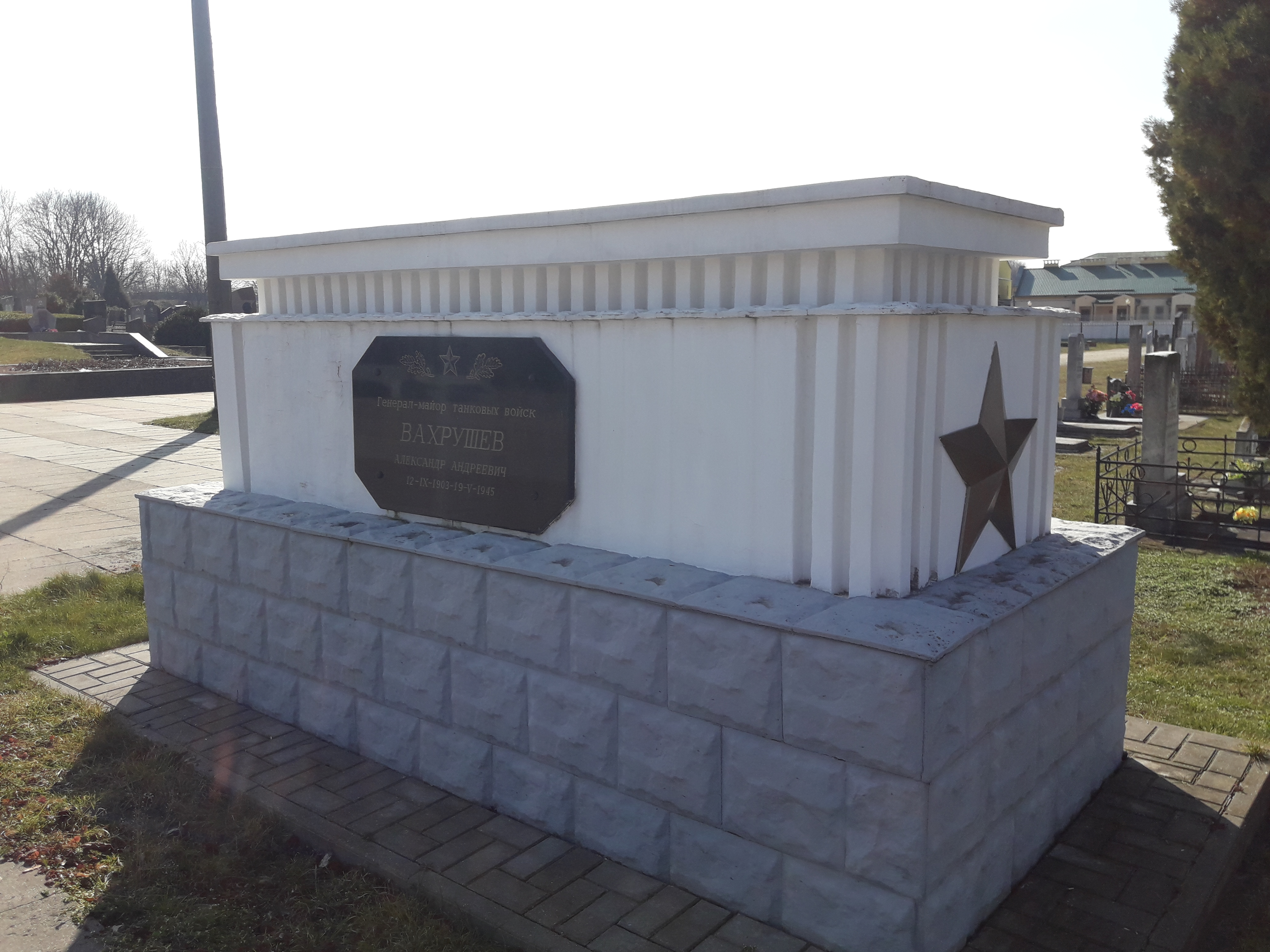 Магіла генерал-маёра Аляксандра Вахрушава на Гарнізонных могілках у Брэсце